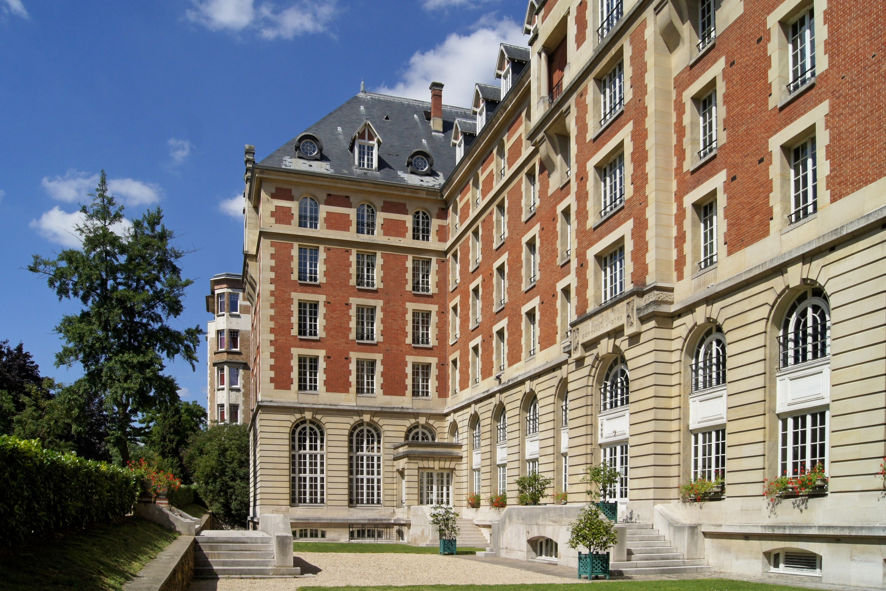 Cité Universitaire de Paris : Fondation Biermans Lapotre.